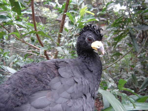 Crax alector